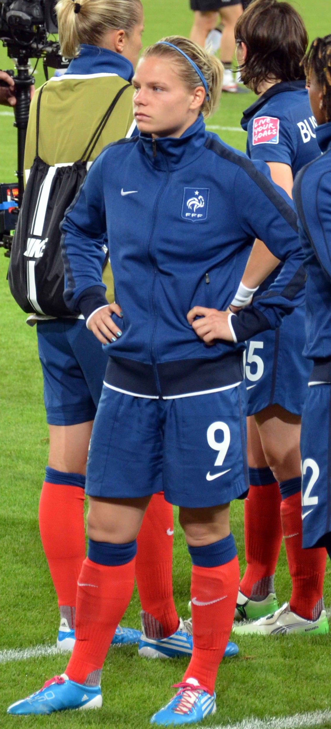 Eugénie Le Sommer - Match de phase de groupes de la coupe du monde entre la France et l'Allemagne le 5 juillet 2011 au Borussiapark de Mönchengladbach